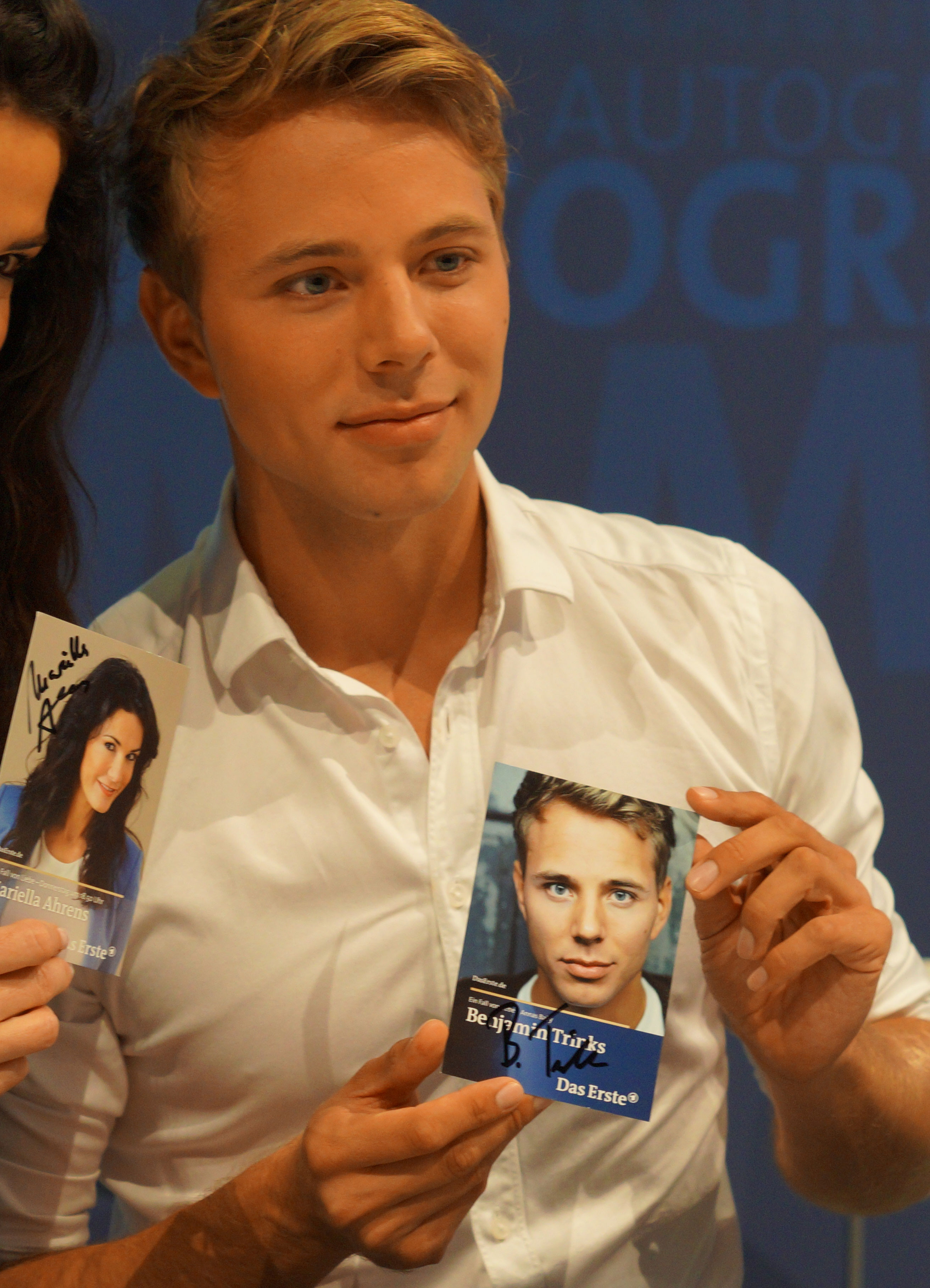 Benjamin Trinks auf der ARD-Programmpräsentation (IFA 2014)